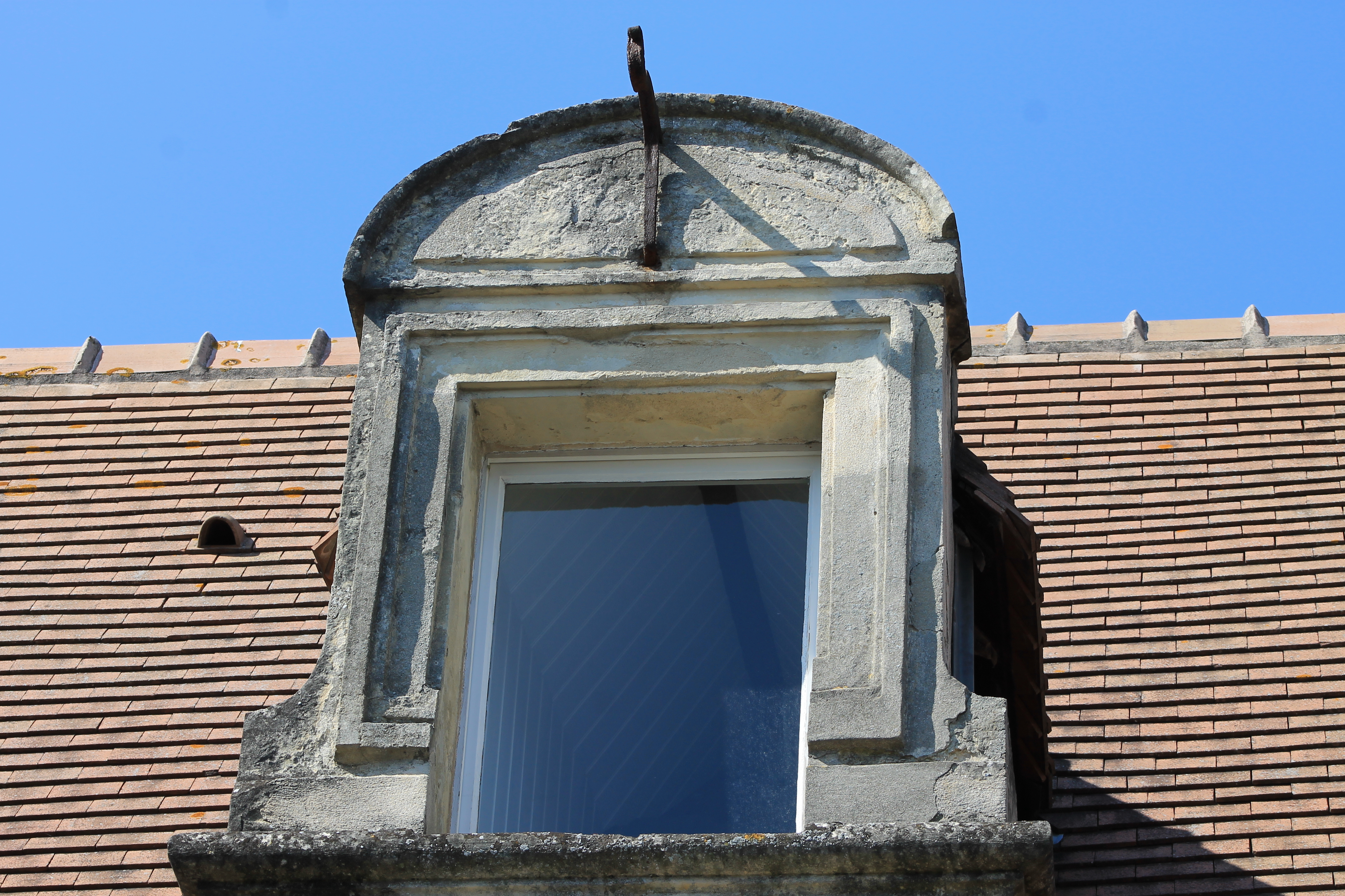 Lucarne avec la date 1625 (très effacée) au 92 rue Bicoquet à Caen (Calvados) Base Mémoire